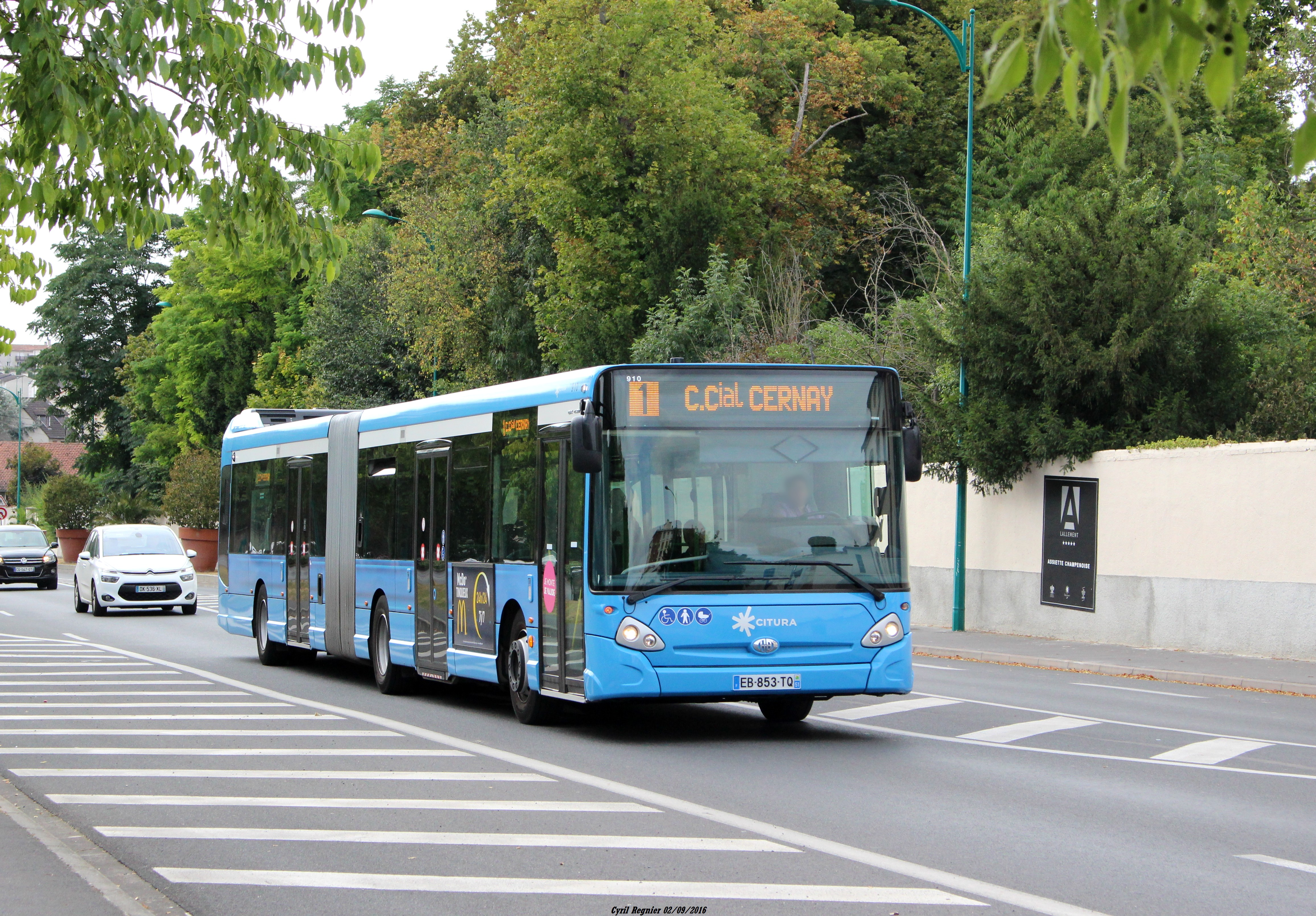 Le 910 sur un renfort de la ligne 1, sous sa robe "Azur"